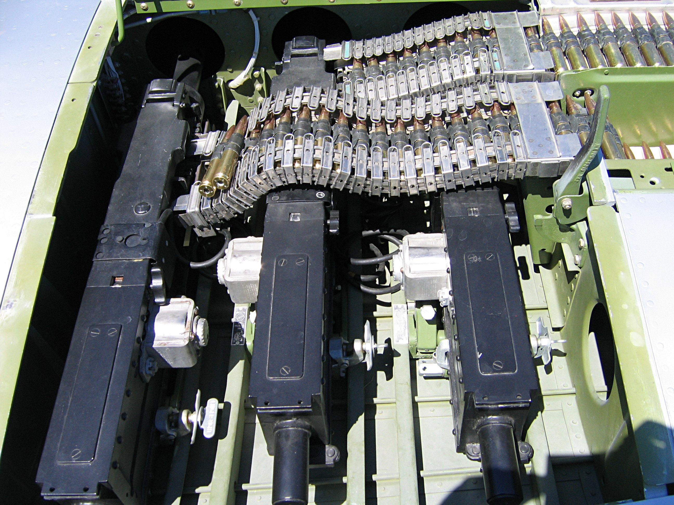 P-51 MGP-51 Guns